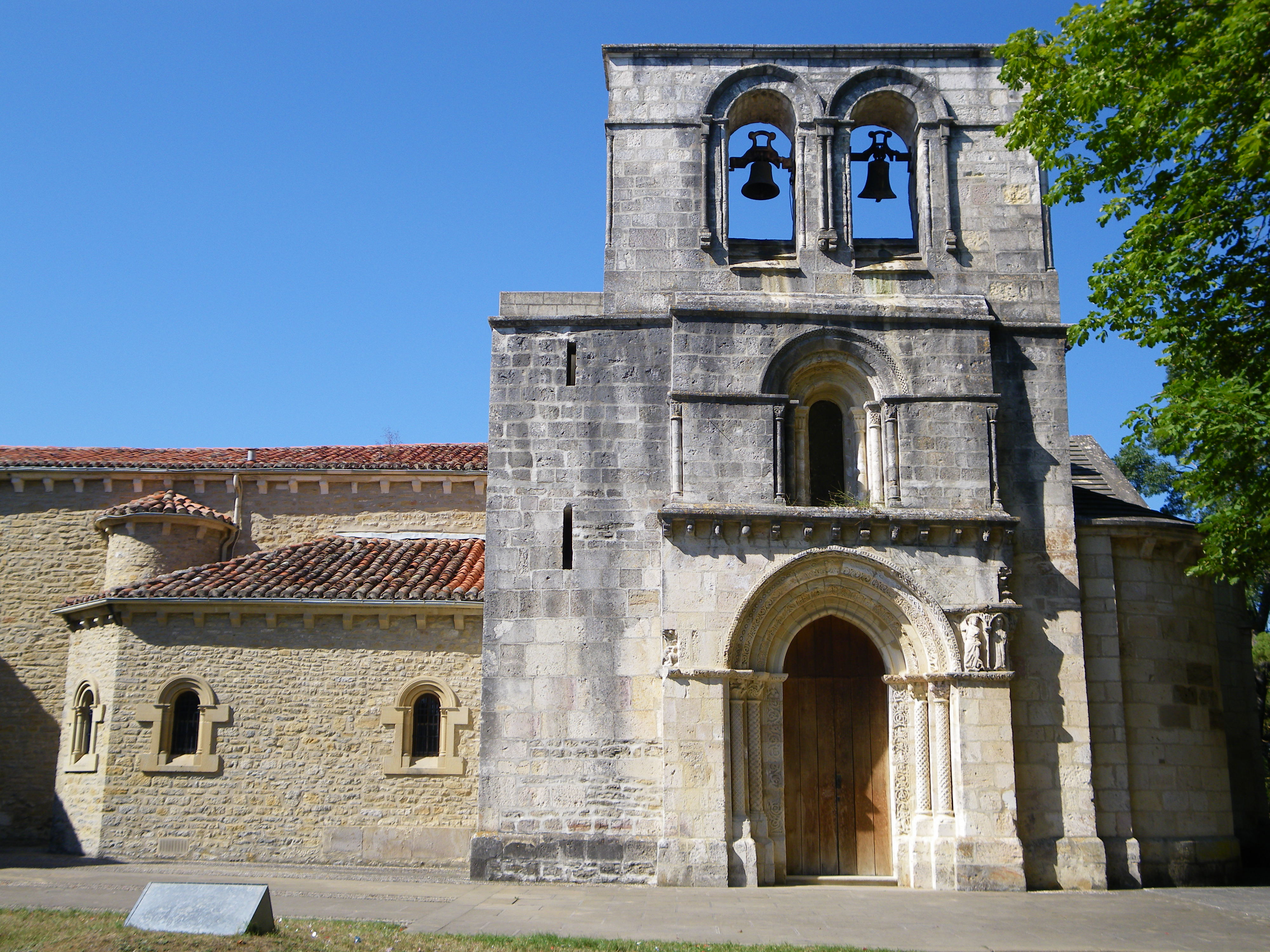 Estibalitzeko basilika erromanikoaren hegoaldeko fatxada, Gasteiz, Araba, Euskal Herria.